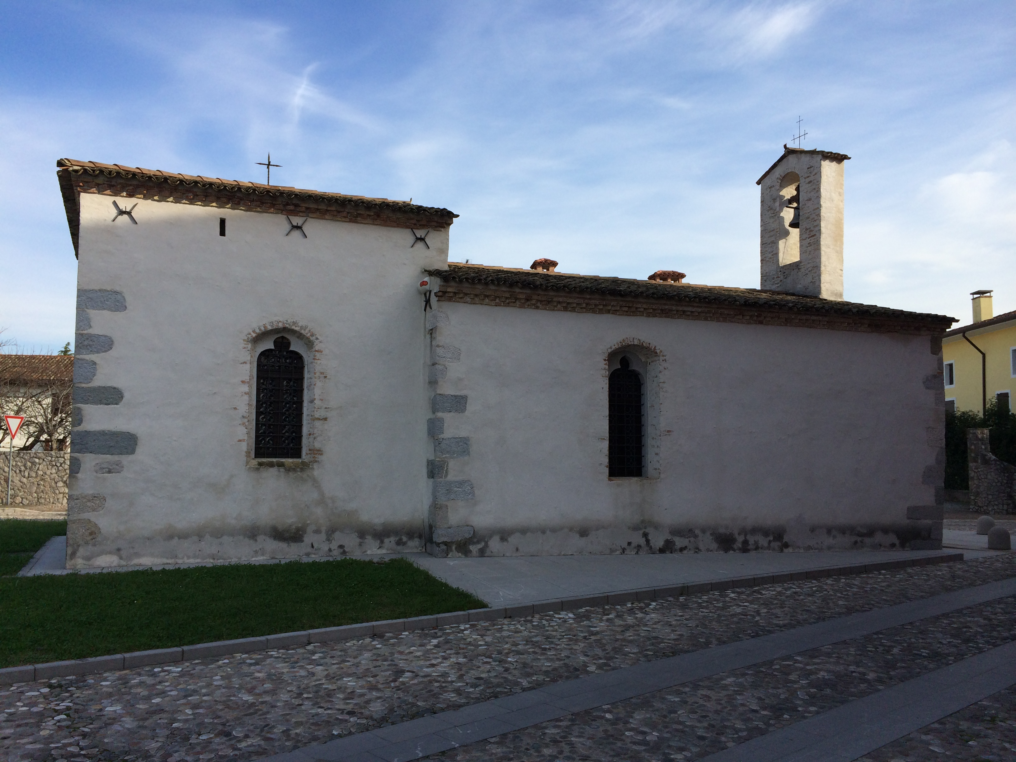 Coseano - chiesetta di San Rocco